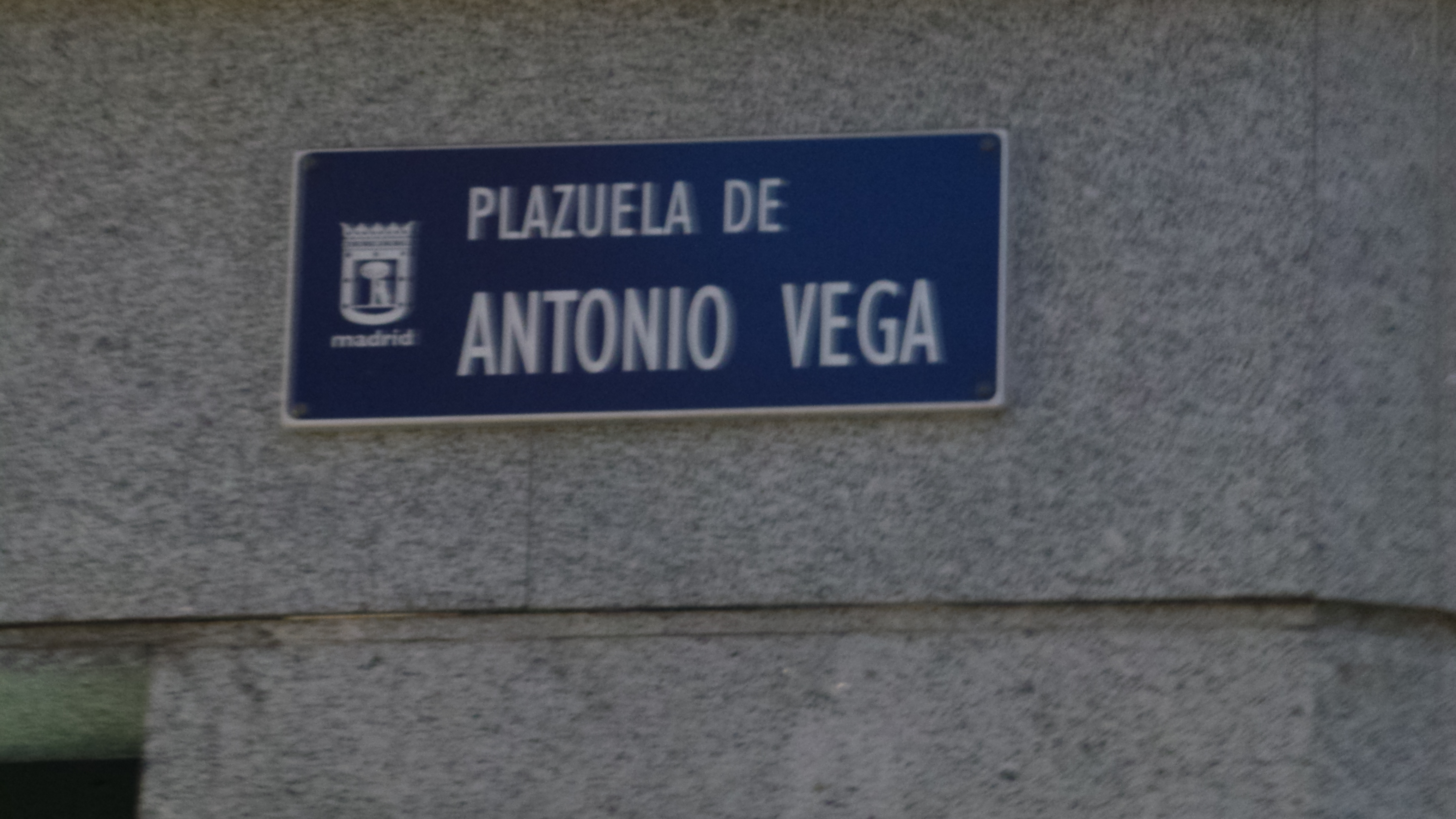 Placa con el nombre de la Plazuela de Antonio Vega, en el barrio de Malasaña de Madrid. Situada en la confluencia de la calle Corredera Alta de San Pablo y de las calles Velarde y Fuencarral. Fue inaugurada en homenaje al músico Antonio Vega el 23 de marzo de 2011. Calles de Madrid